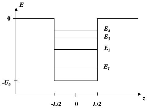 Niveaux d'énergie d'un puits quantique de profondeur U0 et de largeur L